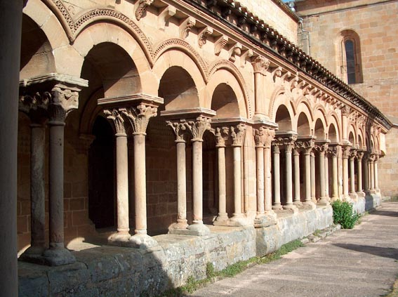 Claustro de San Pedro - Ala oriental La imagen es mía y la protejo bajo GFDL Categoría:Arquitectura (imagen) Categoría:España (imagen)